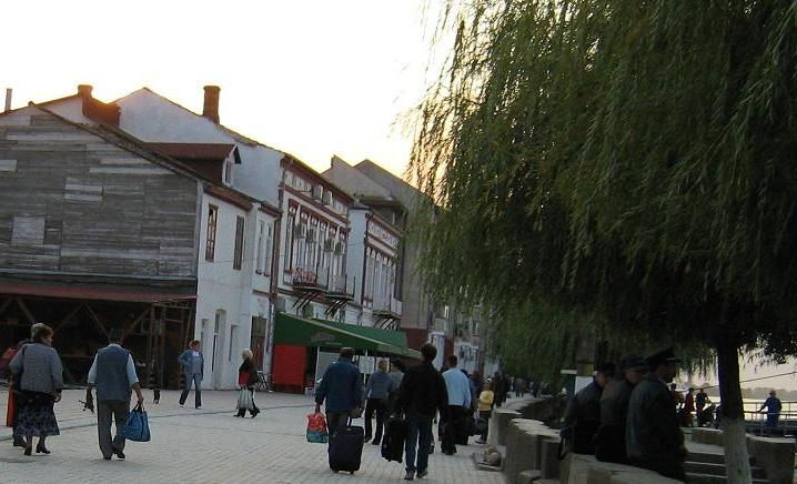 Așa numita „Casa Jean Bart”